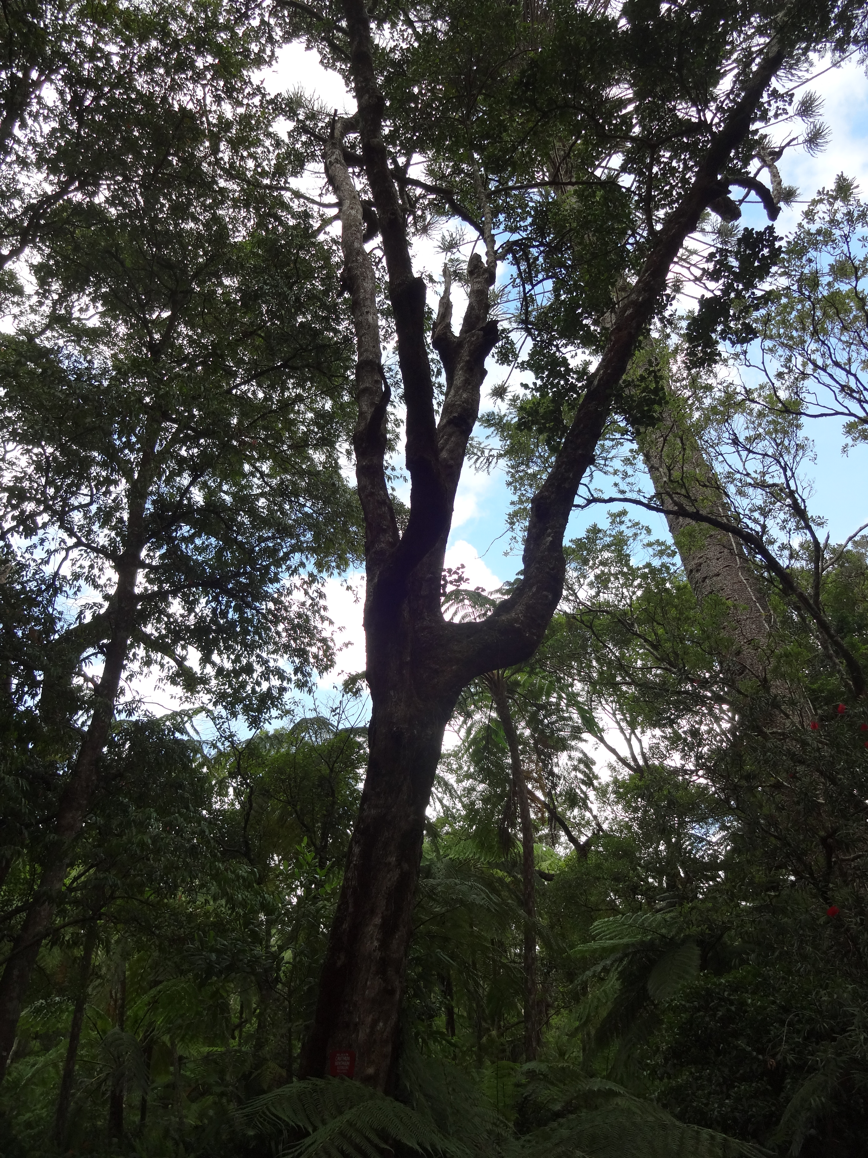 Psydrax montana (Canthium montana) in Hakgala Botanical Garden